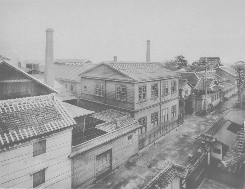 佐賀県谷口鉄工場